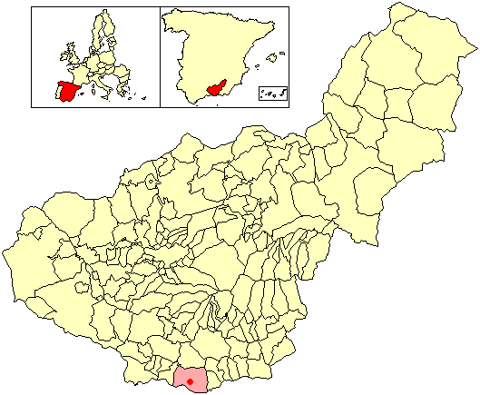 Situación de la localidad de Puntalón (en el municipio de Motril) respecto a la provincia de Granada, en España.